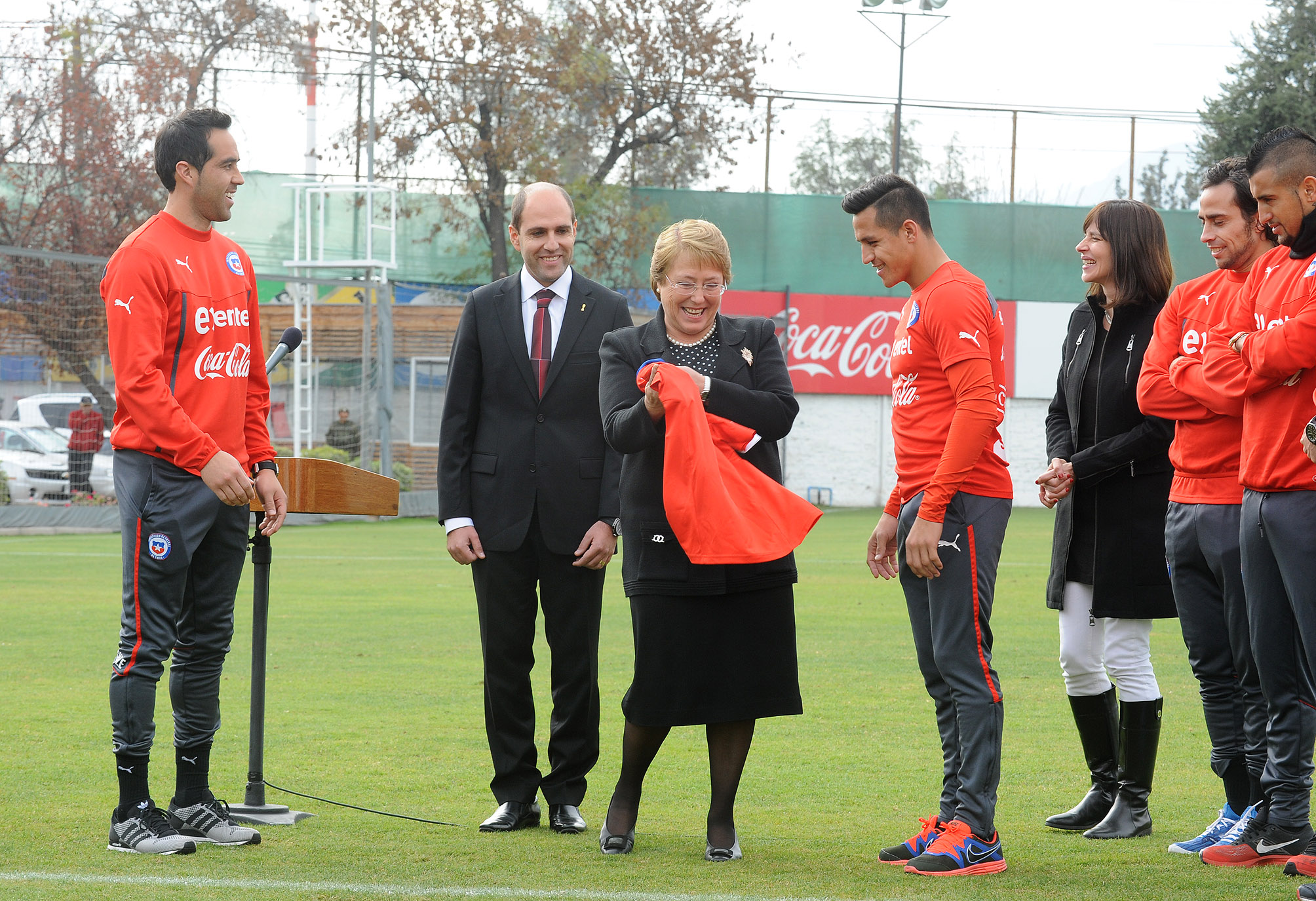 Presidenta Michelle Bachelet despide a la Selección Chilena antes de su viaje al Mundial Brasil 2014.